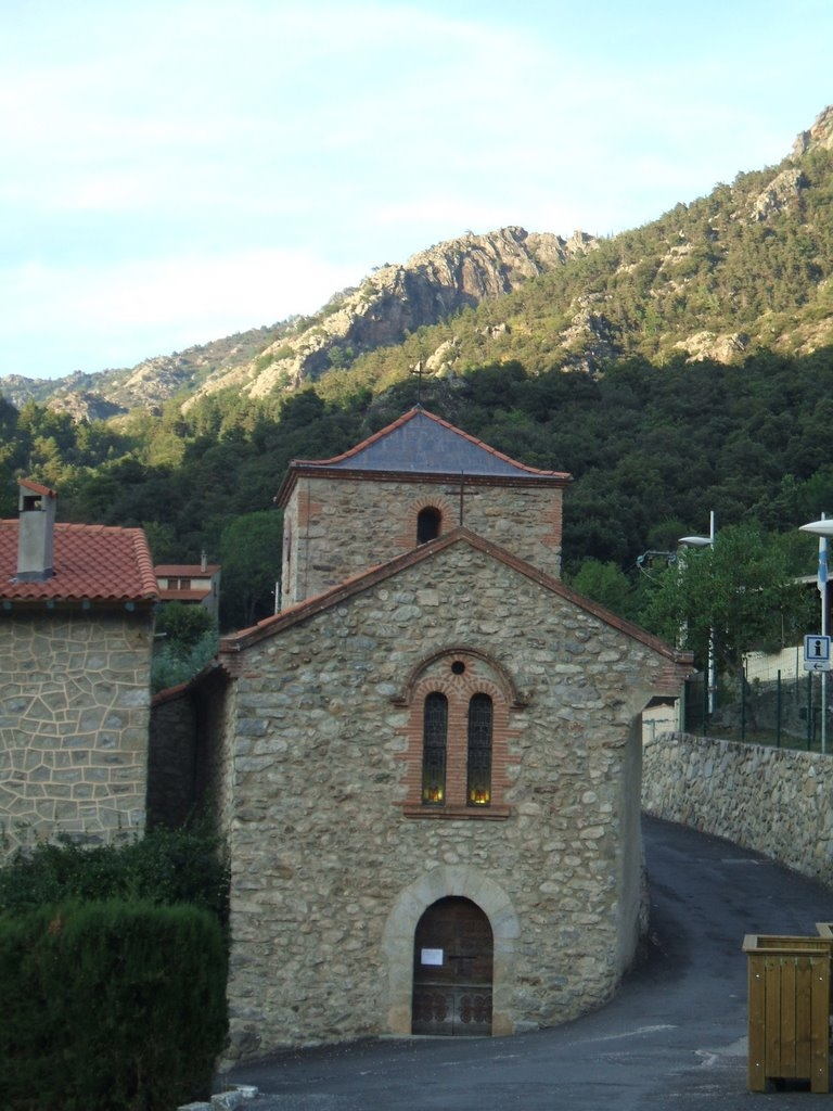 Casteil (Pyrénées-Orientales, France) : église paroissiale Saint-Martin (XVIIème siècle) : vue générale de l'édifice